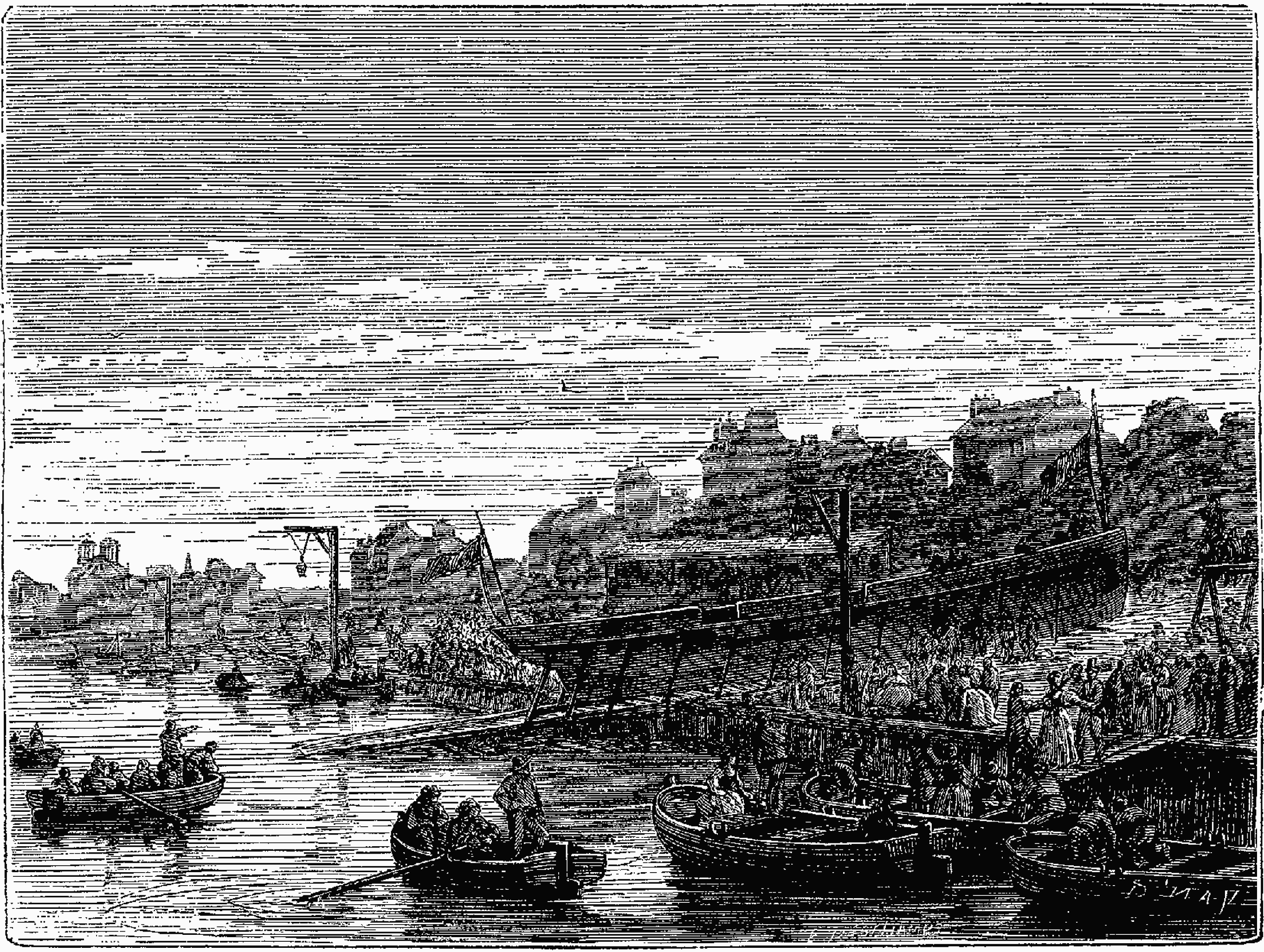 Le Charles Philippe, lancé sur la Seine, à Bercy, par le marquis de Jouffroy, le 20 août 1818